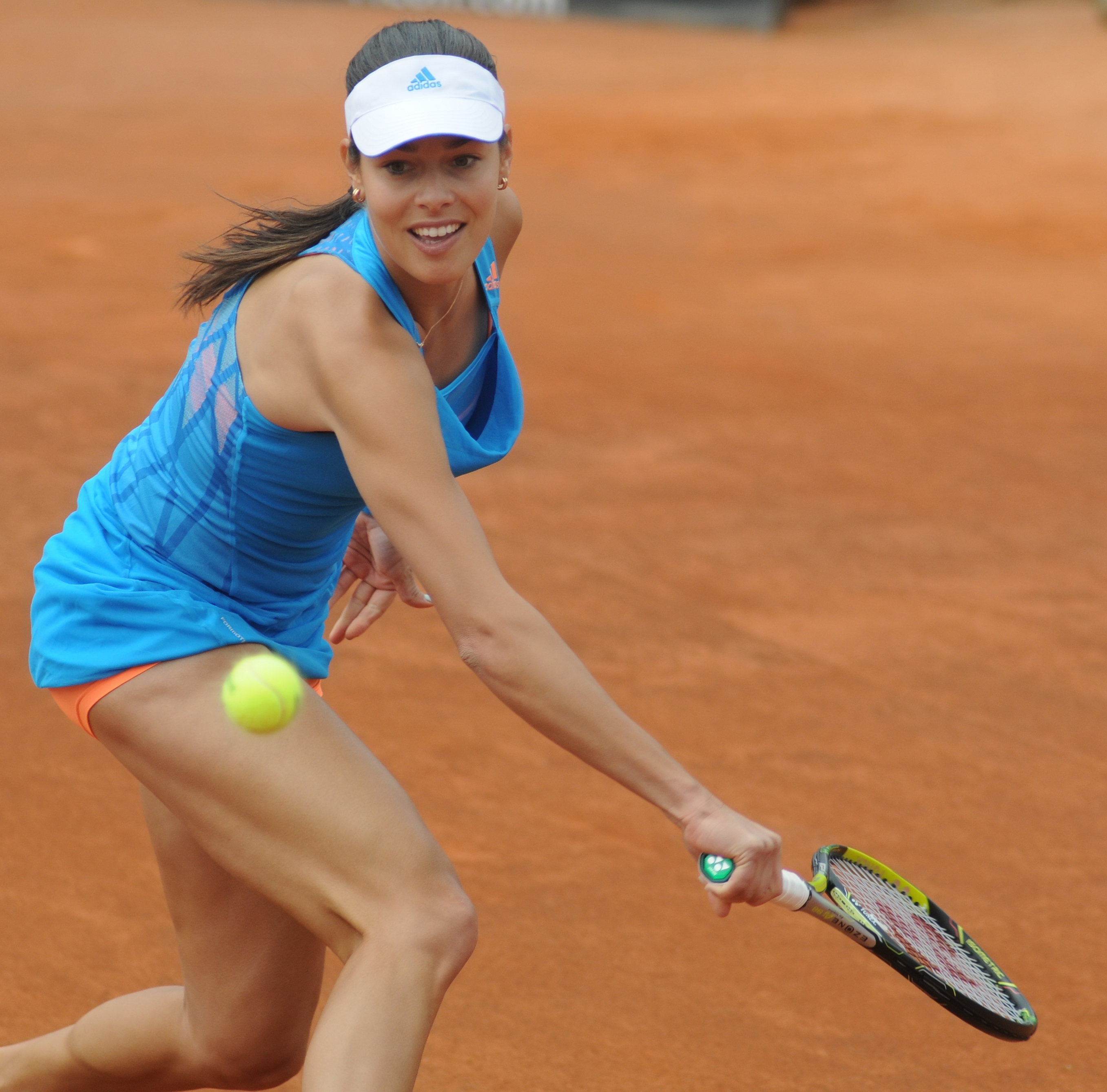 Ana Ivanovic Rome 2014